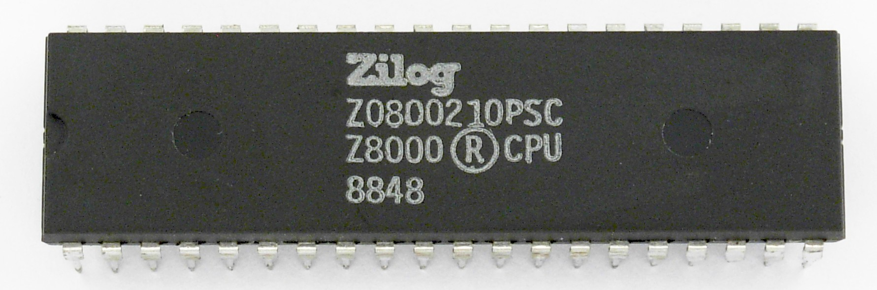 Zilog Z0800210PSC (Z8000 CPU)